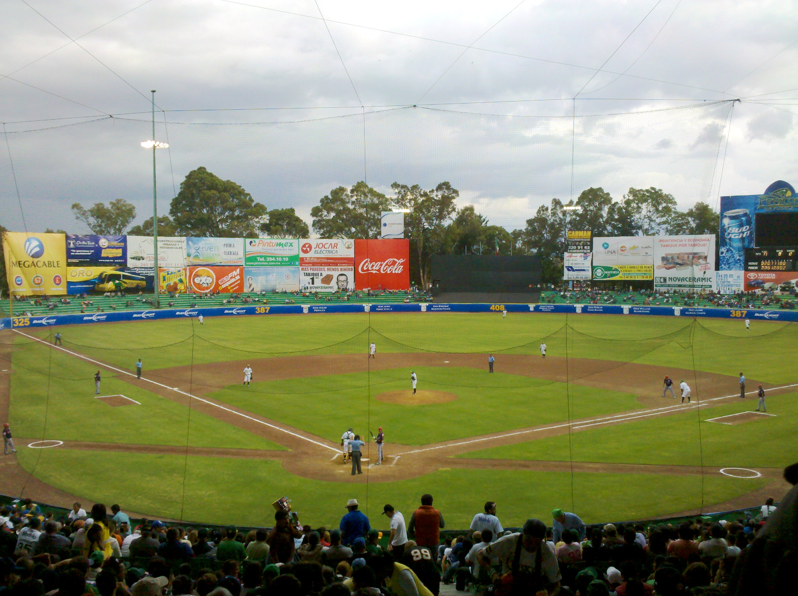 Piratas de Campeche vs Pericos de Puebla. 24 de agosto de 2014. Estadio Hermanos Serdán. Puebla, México.